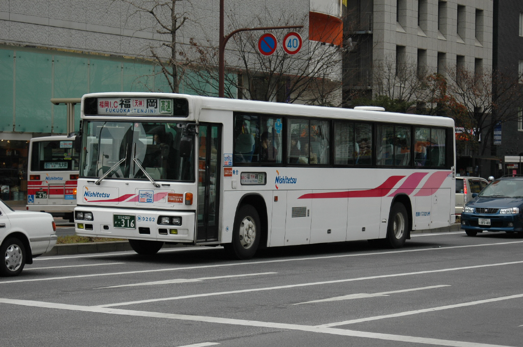 福岡高速 天神付近にて、2007-2-5撮影